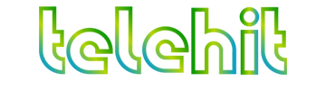 Texto utilizado actualmente en el logo del canal mexicano de música, Telehit.